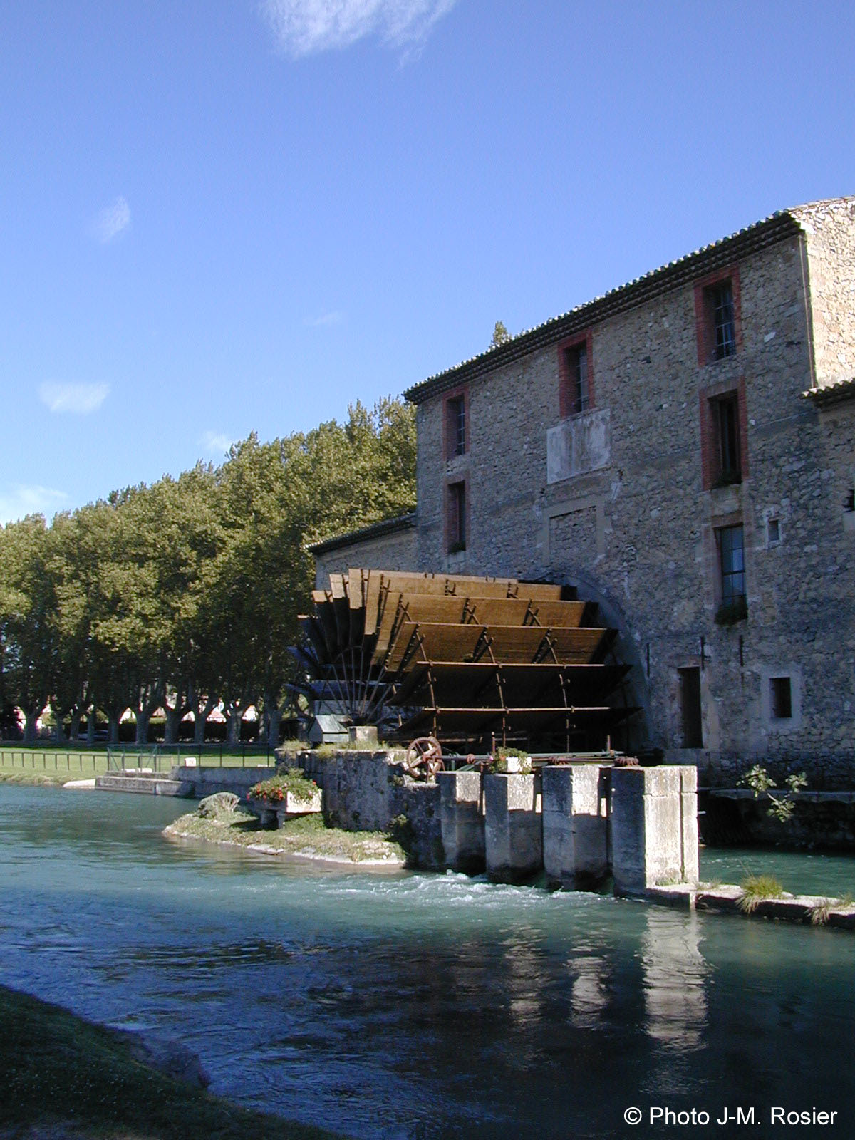 Watermill in Les Taillades France / (fr:)le moulin à eau des Taillades dans le Vaucluse